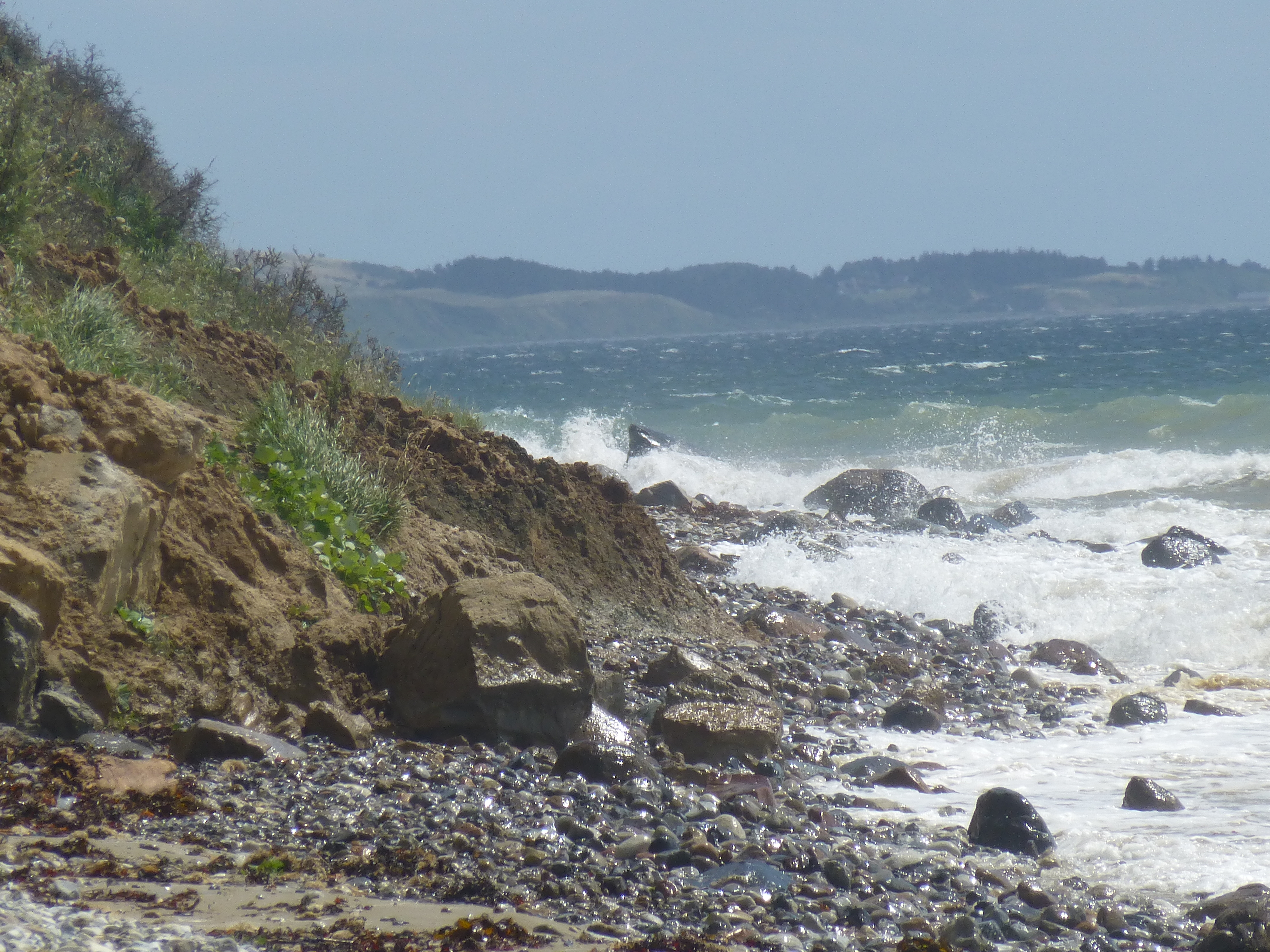 Den vestlige del af Mols Hoved